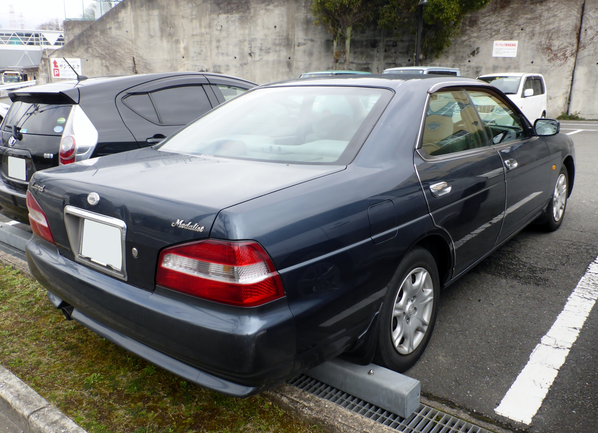 C35型日産・ローレルメダリストをリアから撮影。